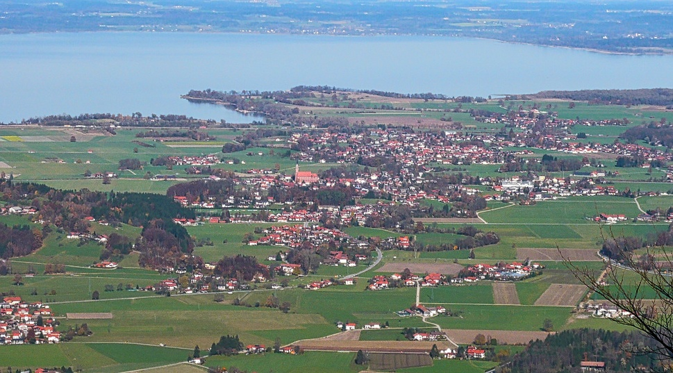 Uebersee (Chiemgau)